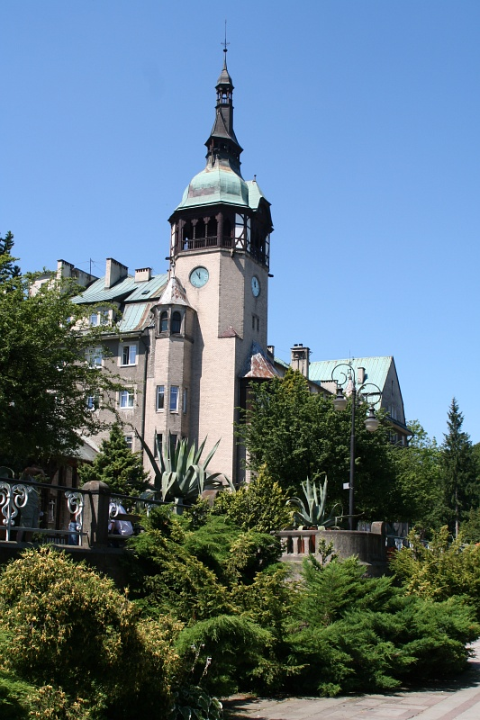 Świeradów-Zdrój - Dom Zdrojowy